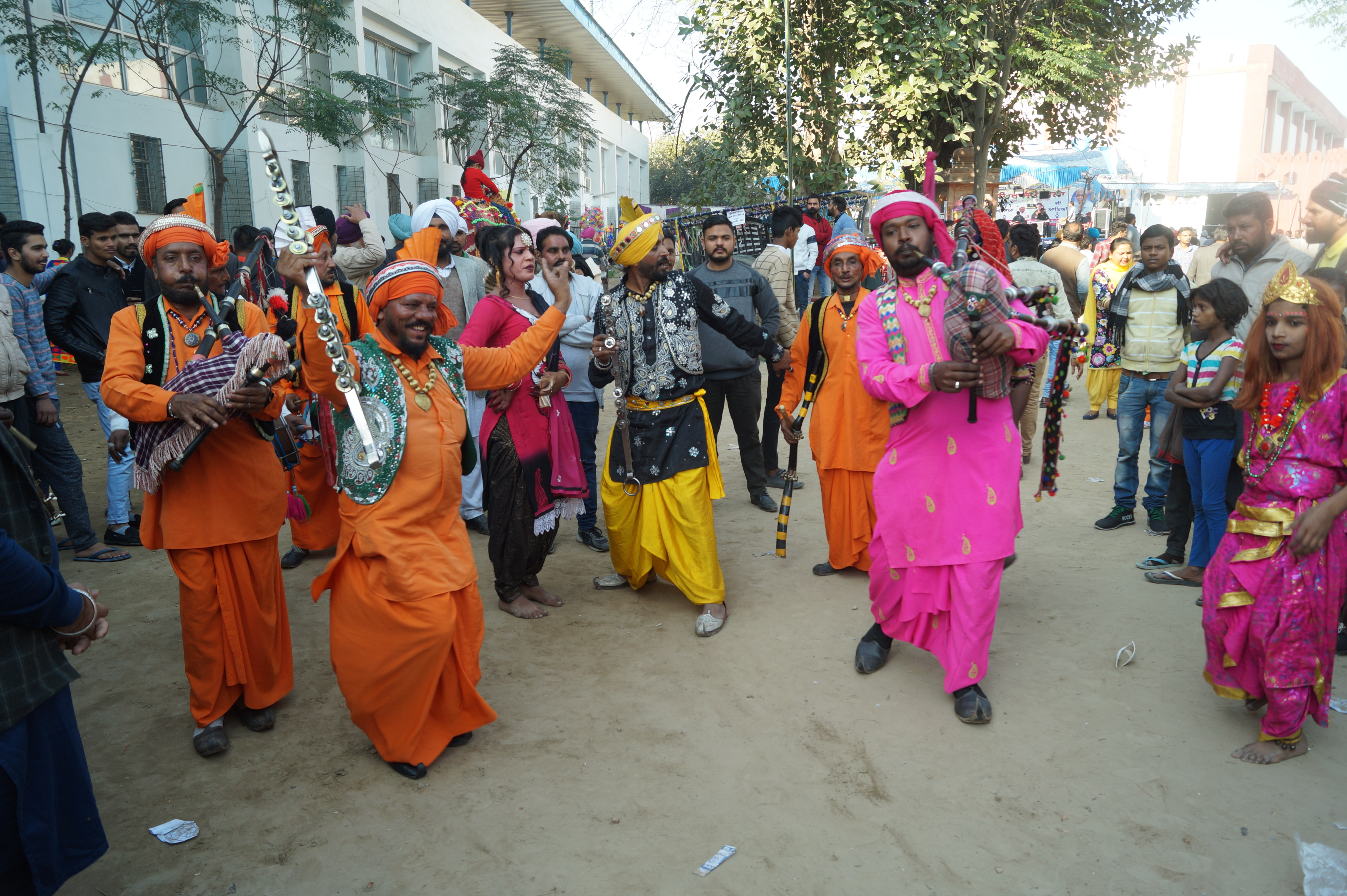 Virasti Mela, Bathinda (Punjabi Heritage Festival)